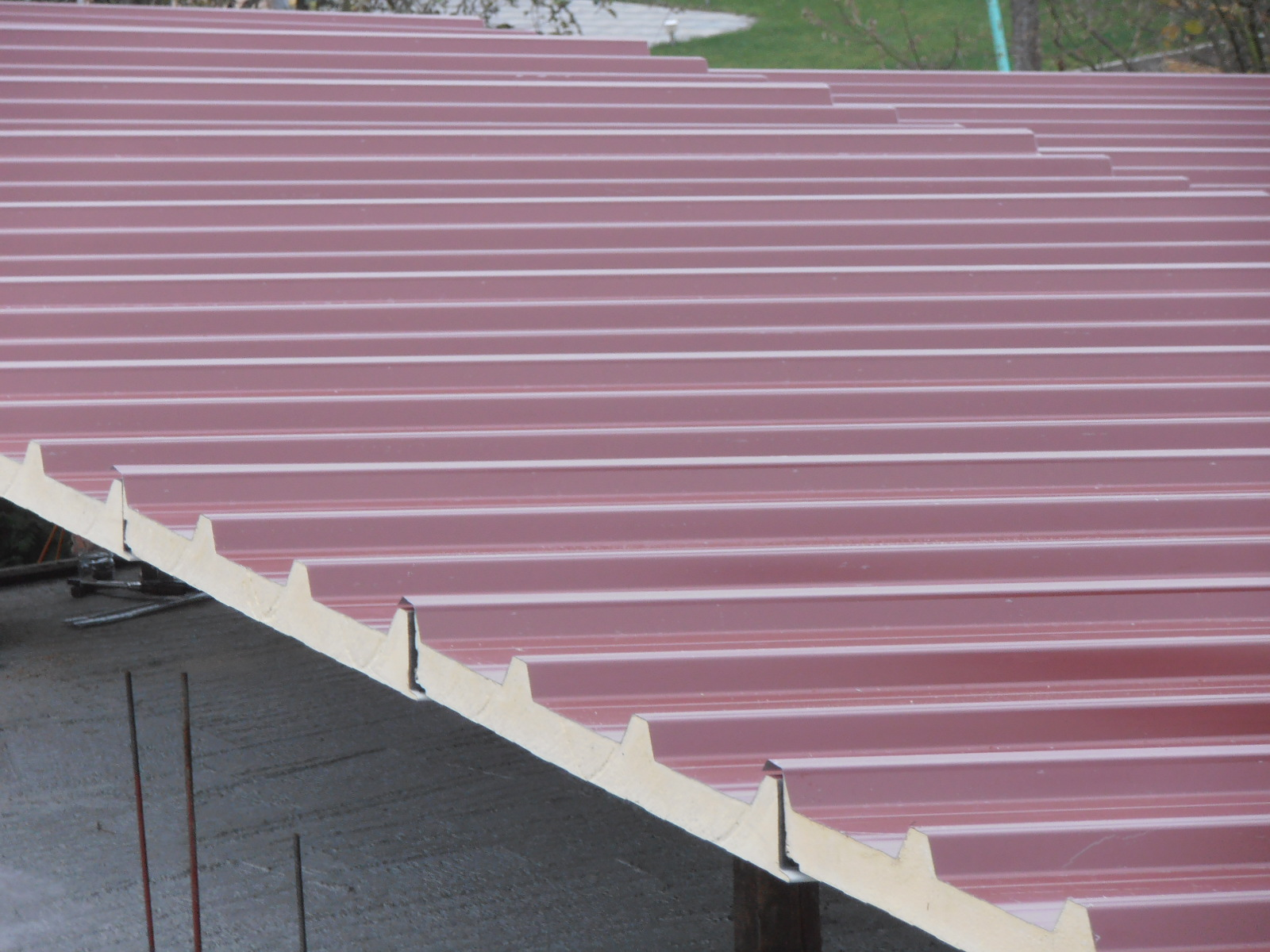 Errichtung eines Daches aus Sandwichpaneel-Elementen Beschichtete Trapezbleche mit 60 mm PUR-Kern (Teilansicht) Die Farbe des Deckblechs RAL 8012 ist auf dem Foto nicht zu erkennen. Sandwichpaneeldachelementquerschnittskizze